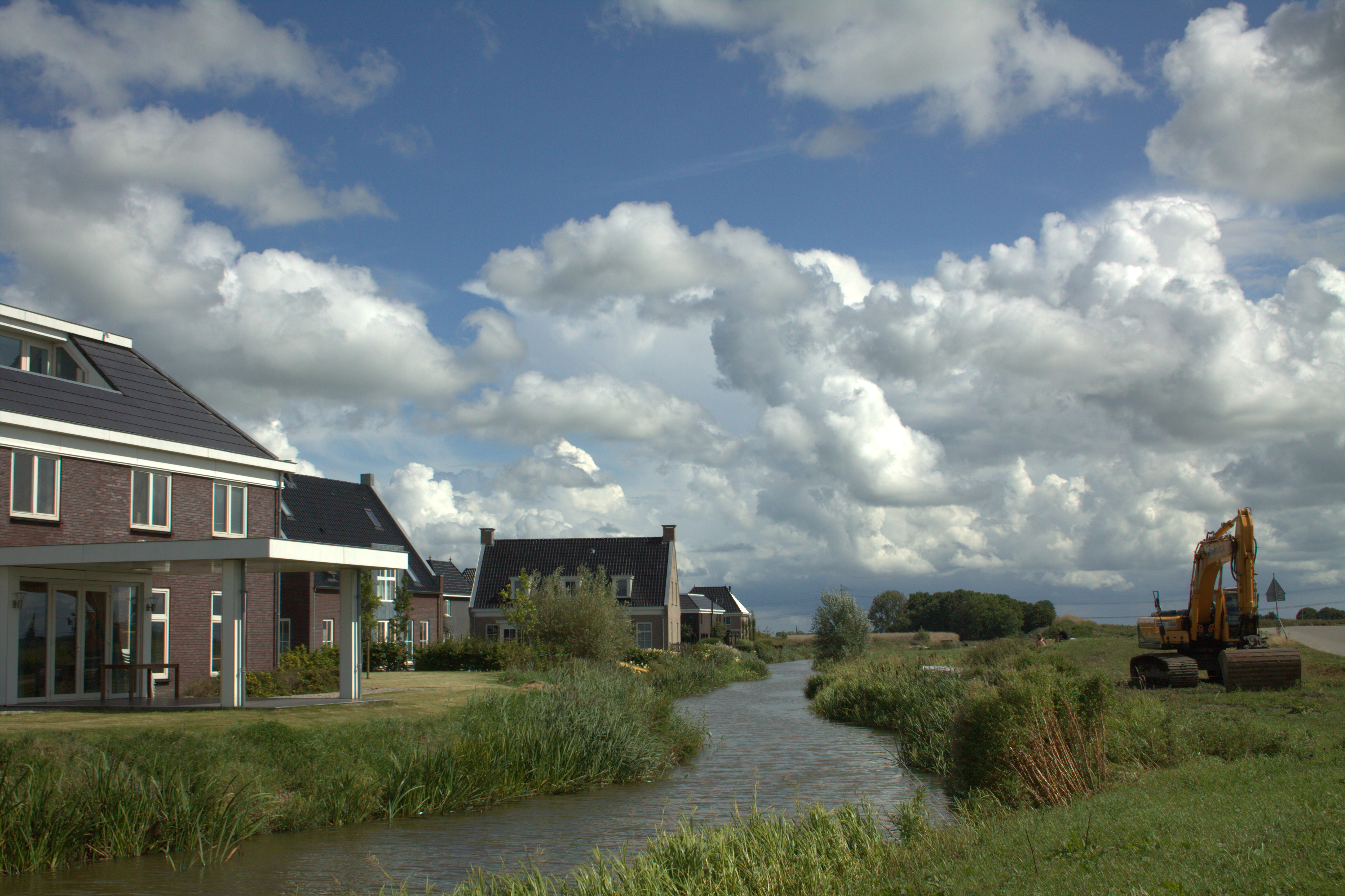 Techum is nog niet klaar, men is nog volop bezig er iets moois van te maken.